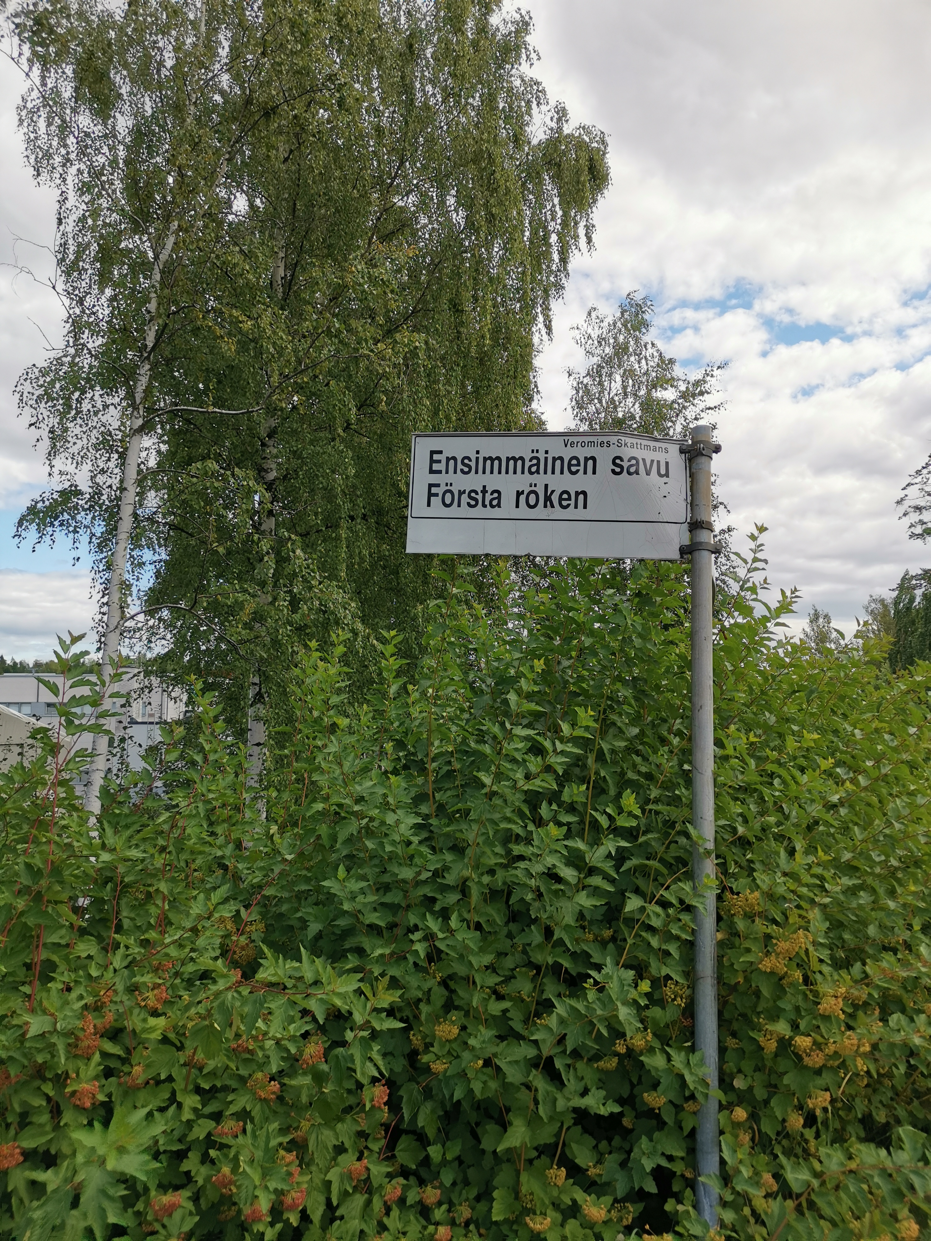 Ensimmäinen savu, katu Vantaalla